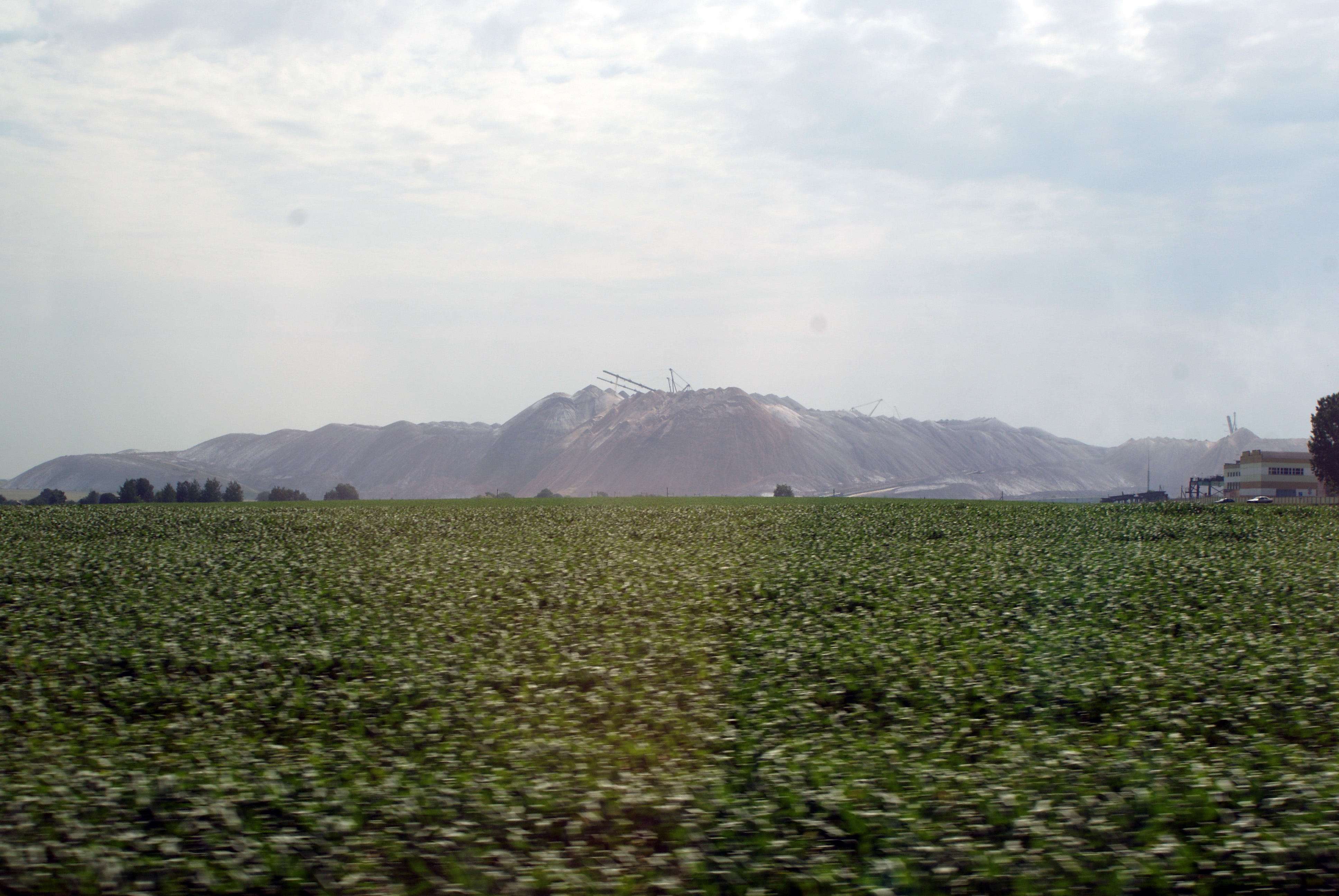 Кар'ер 2-га рудаўпраўлення Салігорскі раён